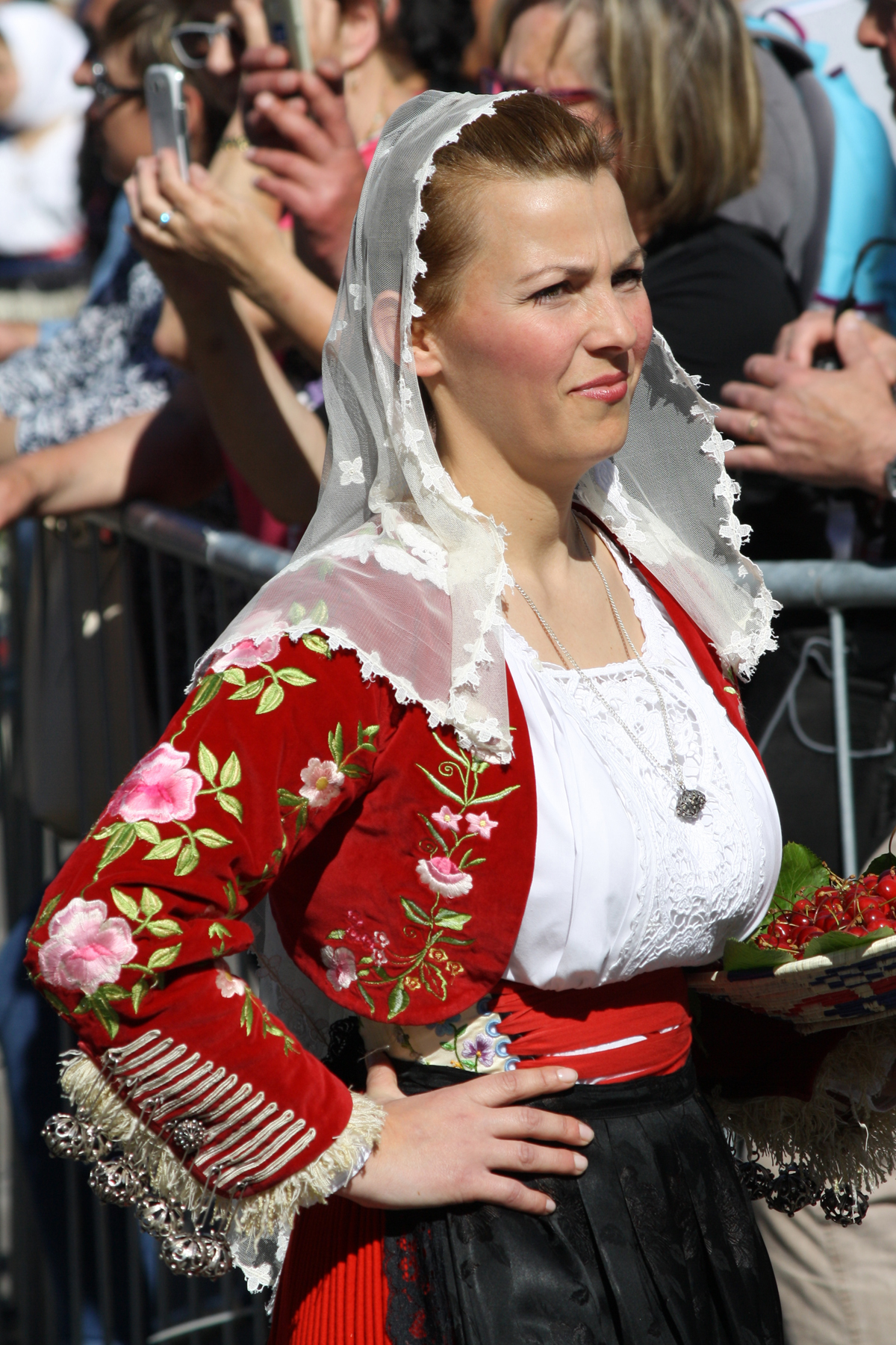 Costume tradizionale femminile di Bonnanaro, SS